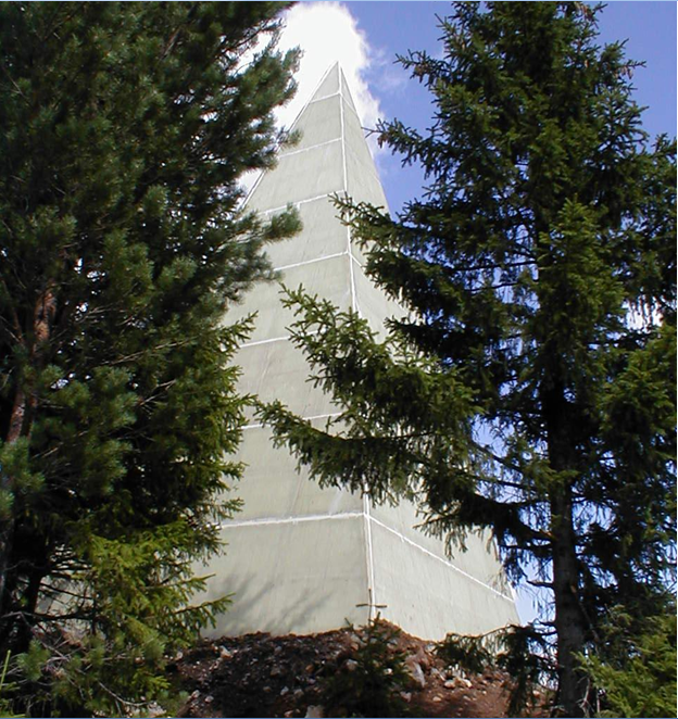 Энергетическая пирамида. Высота - 11м. Установлена в сентябре 2001 г.на курорте Нижние Серги Свердловской области. В 2004 году перенесена в г. Ревду. Стоительство осуществило НП "Спорт, Здоровье, Гармония" (г.Екатеринбург, тел. (343)- 257-3592)